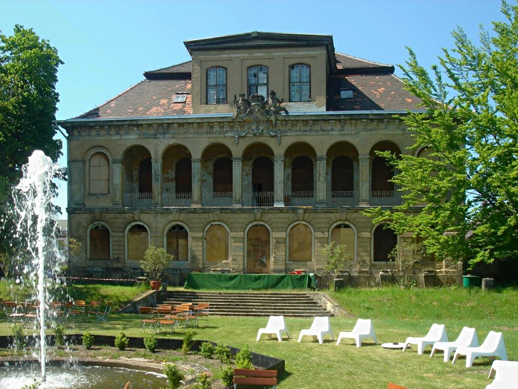 Schloss Übigau, Ansicht vom Schlossgarten aus